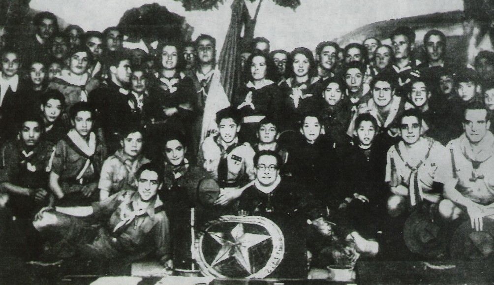 Domingo 12 de enero de 1936, Exploradores y Guías de Granada en el asilo de San Rafael donde ofrecieron una obra de teatro y merienda. En el centro con anteojos, Víctor José Jiménez y Malo de Molina, recién nombrado comisario de Granada.